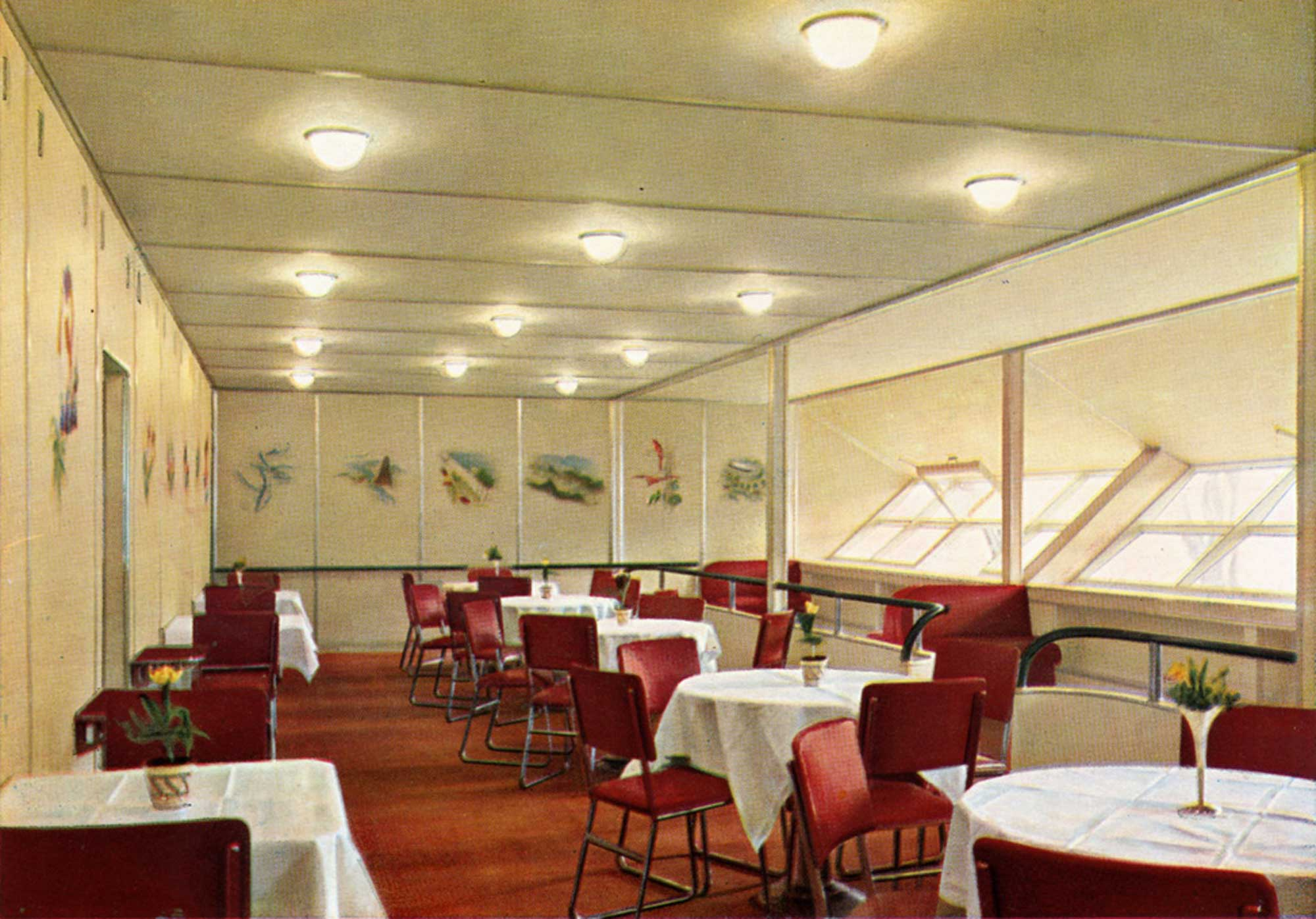 Luftschiff Hindenburg (LZ-129), Speisesaal Speisesaal im Luftschiff "Hindenburg"